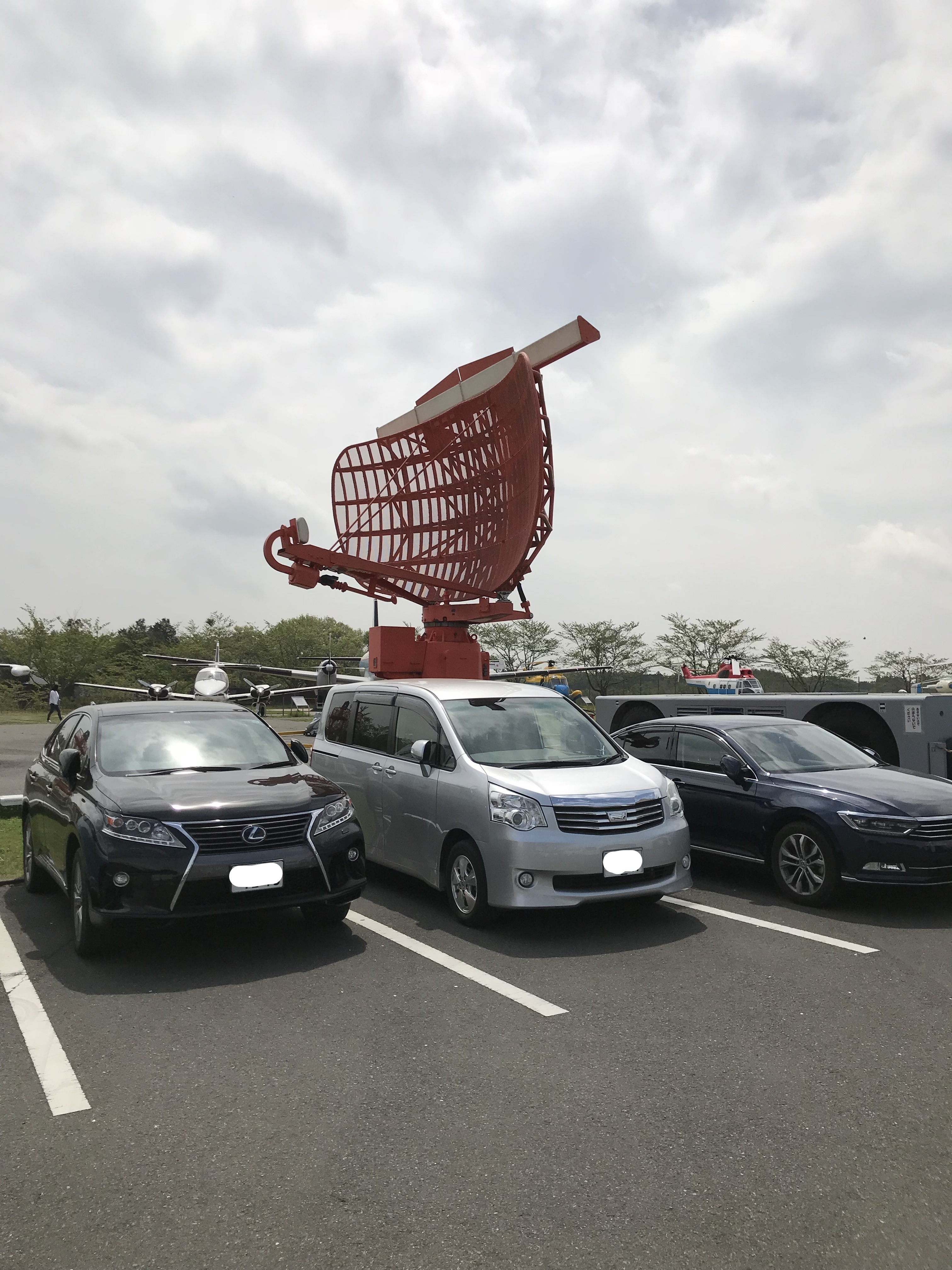 航空科学博物館敷地内で展示される空港監視レーダー。